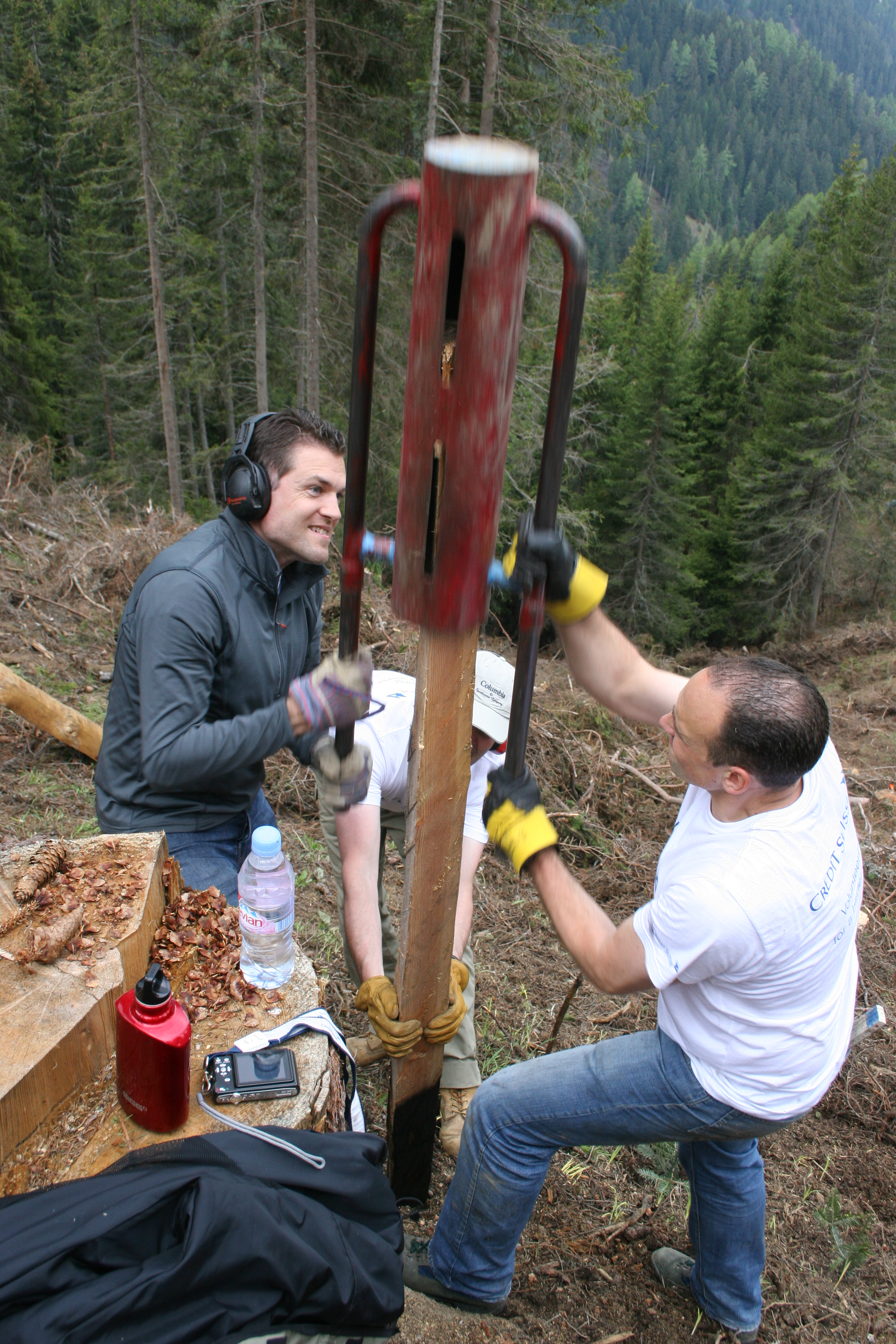 Bergwaldprojekt beim Zaunbau gegen Wildverbiss